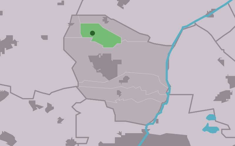 Kaartsje fan himrik fan Feinsum